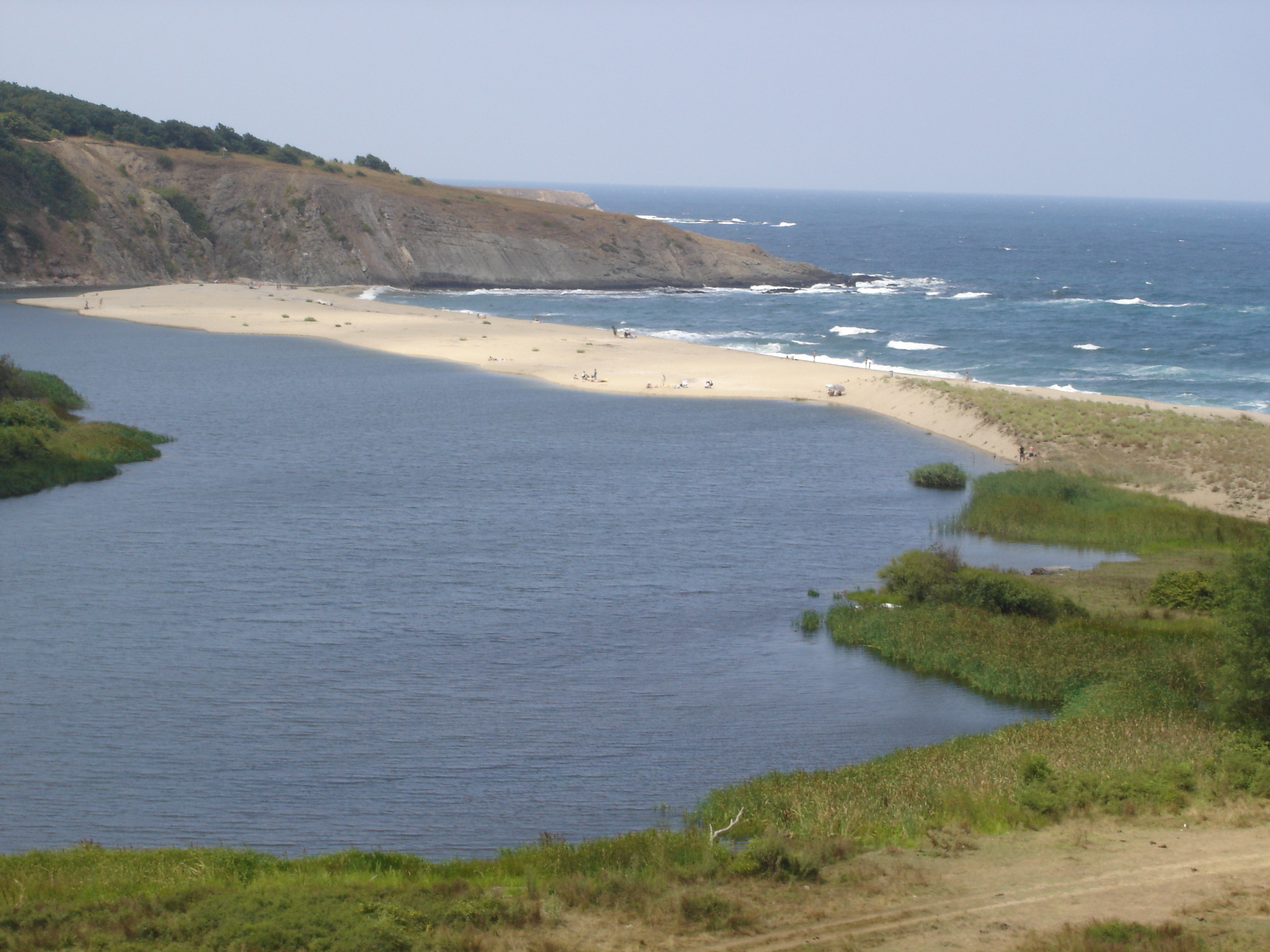 River Veleka, Strandzha Natural Park, Bulgaria